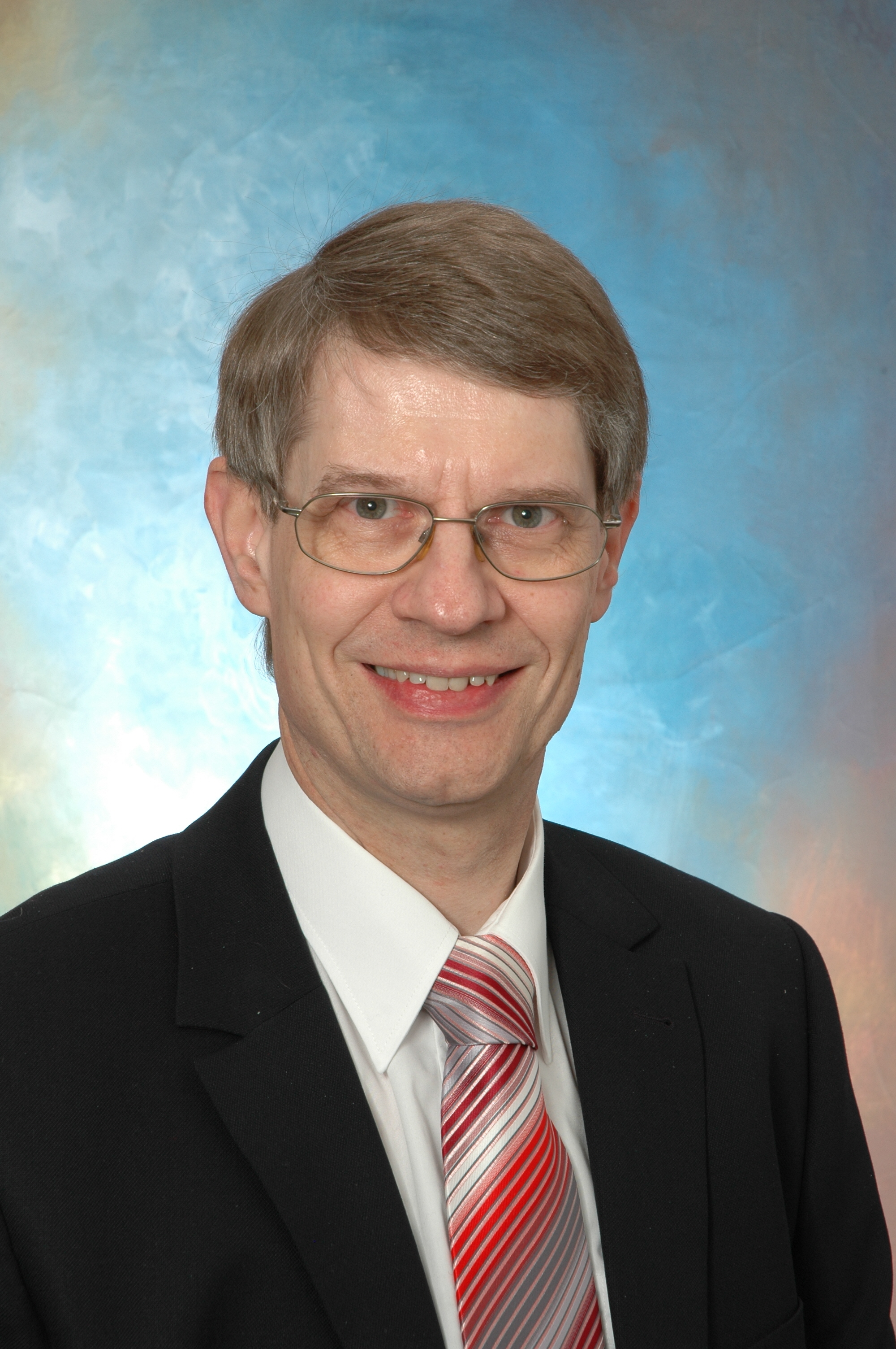 Foto von Dr. Andreas Laschet